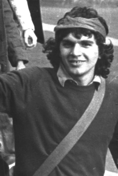 Benedetto Petrone in corteo